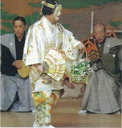 2006.05.14 福井四郎兵衛襲名披露の際の「花筐」 シテ野村四郎